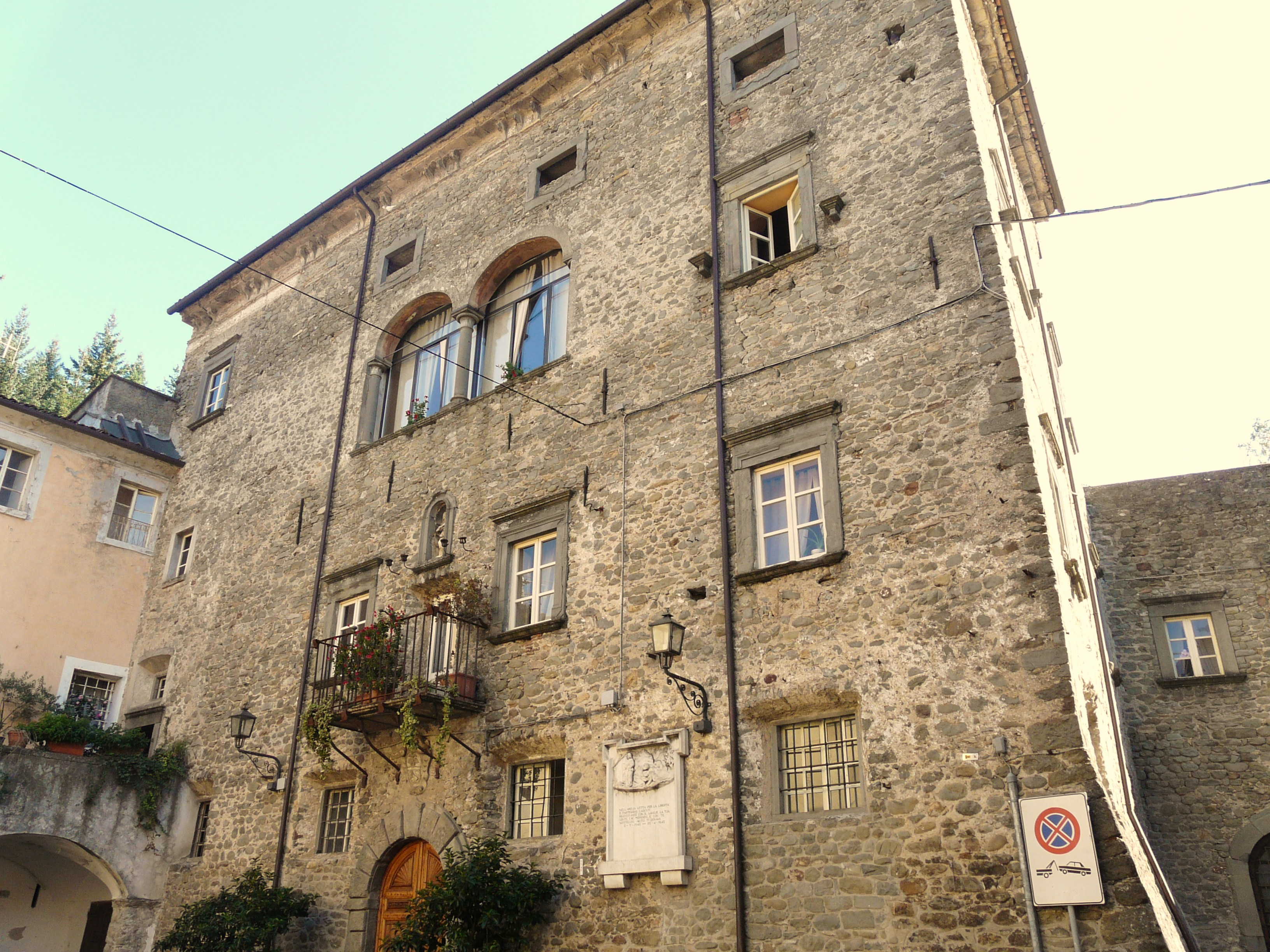 Castello di Licciana Nardi, Toscana, Italia